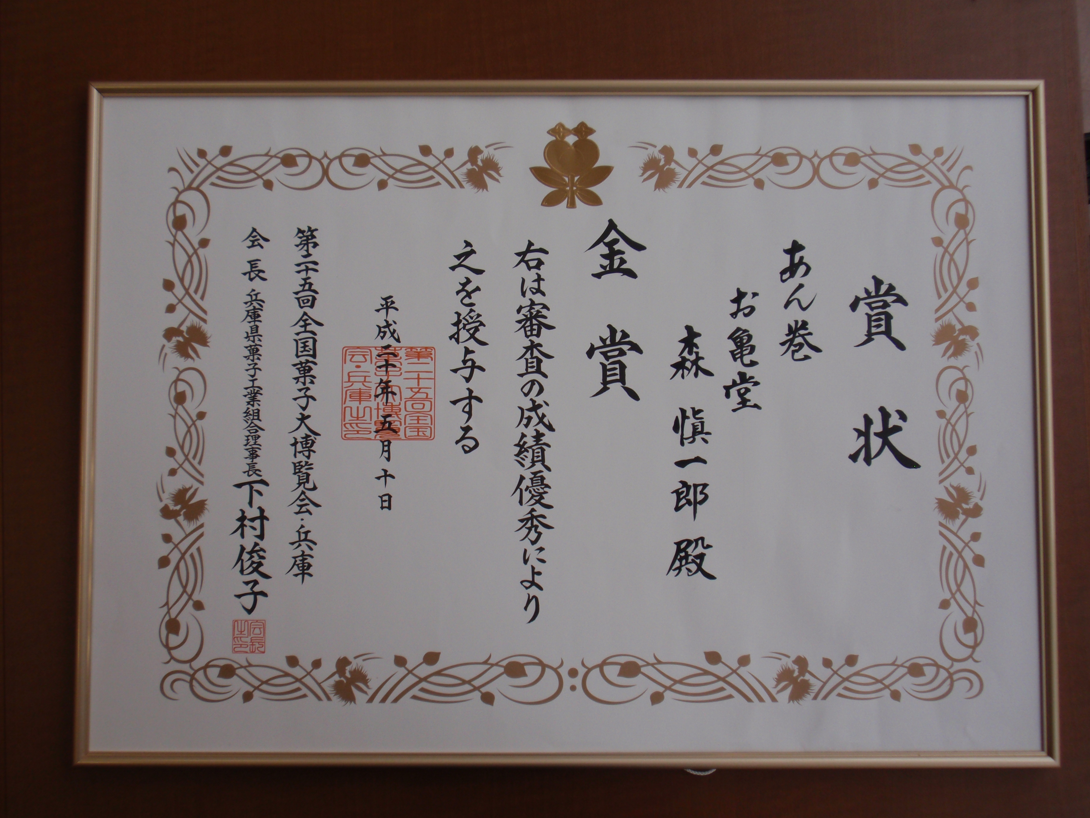 もっちりあん巻き受賞歴